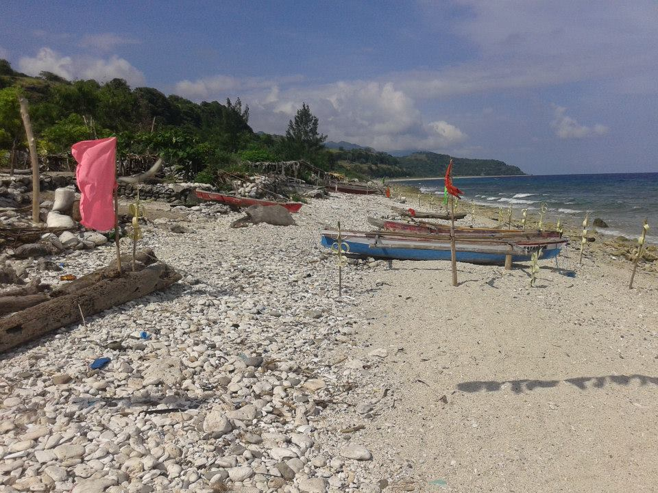 Atauro